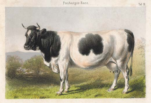 Vache de race fribourgeoise